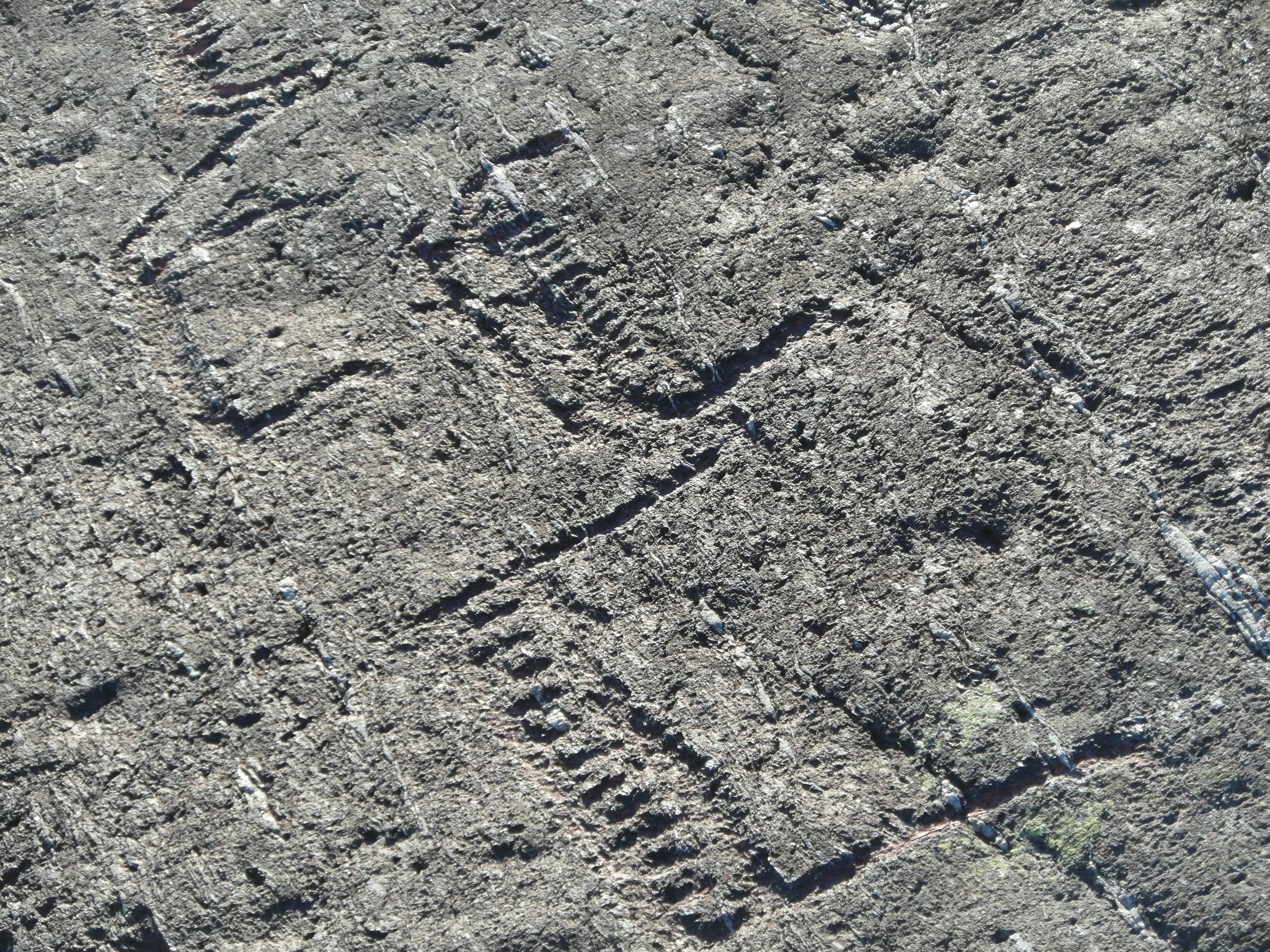 Helleristningsskib ifra bronsealderen på Åmøy utenfor Stavanger.